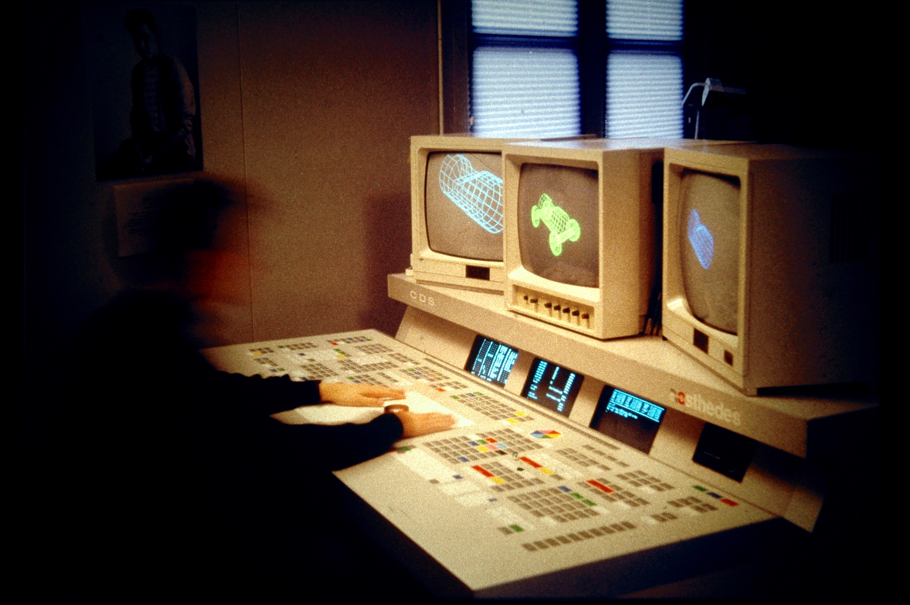 De Aesthedes 1, bij het bedrijf Computer Aided Visuals in Amsterdam. Foto: Paul Bronwasser